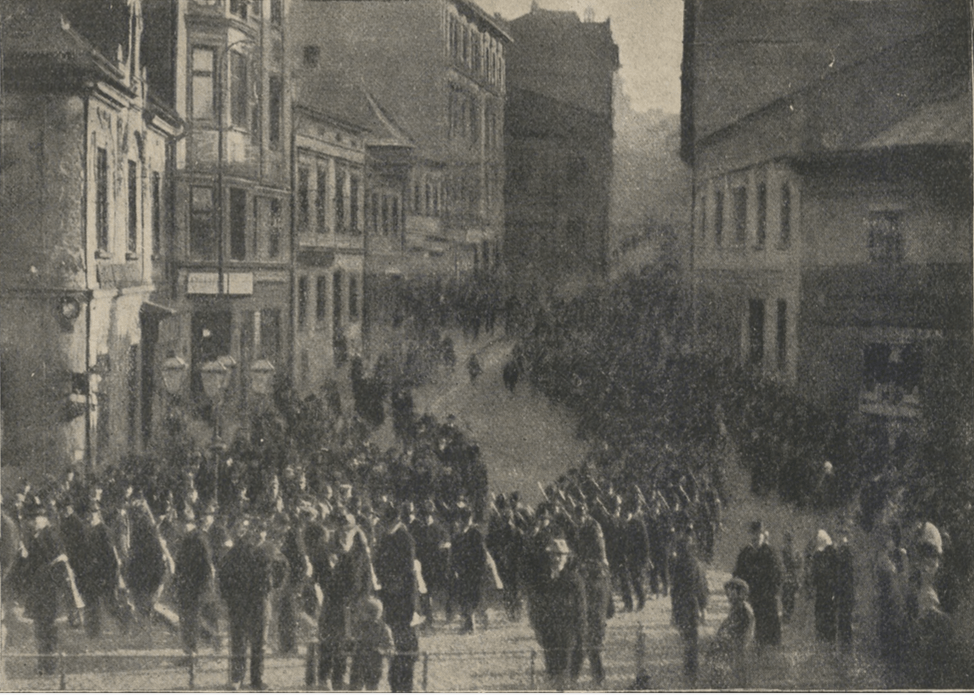 Milicja Polska Śląska Cie­szyńskiego - pochód w Cieszynie.